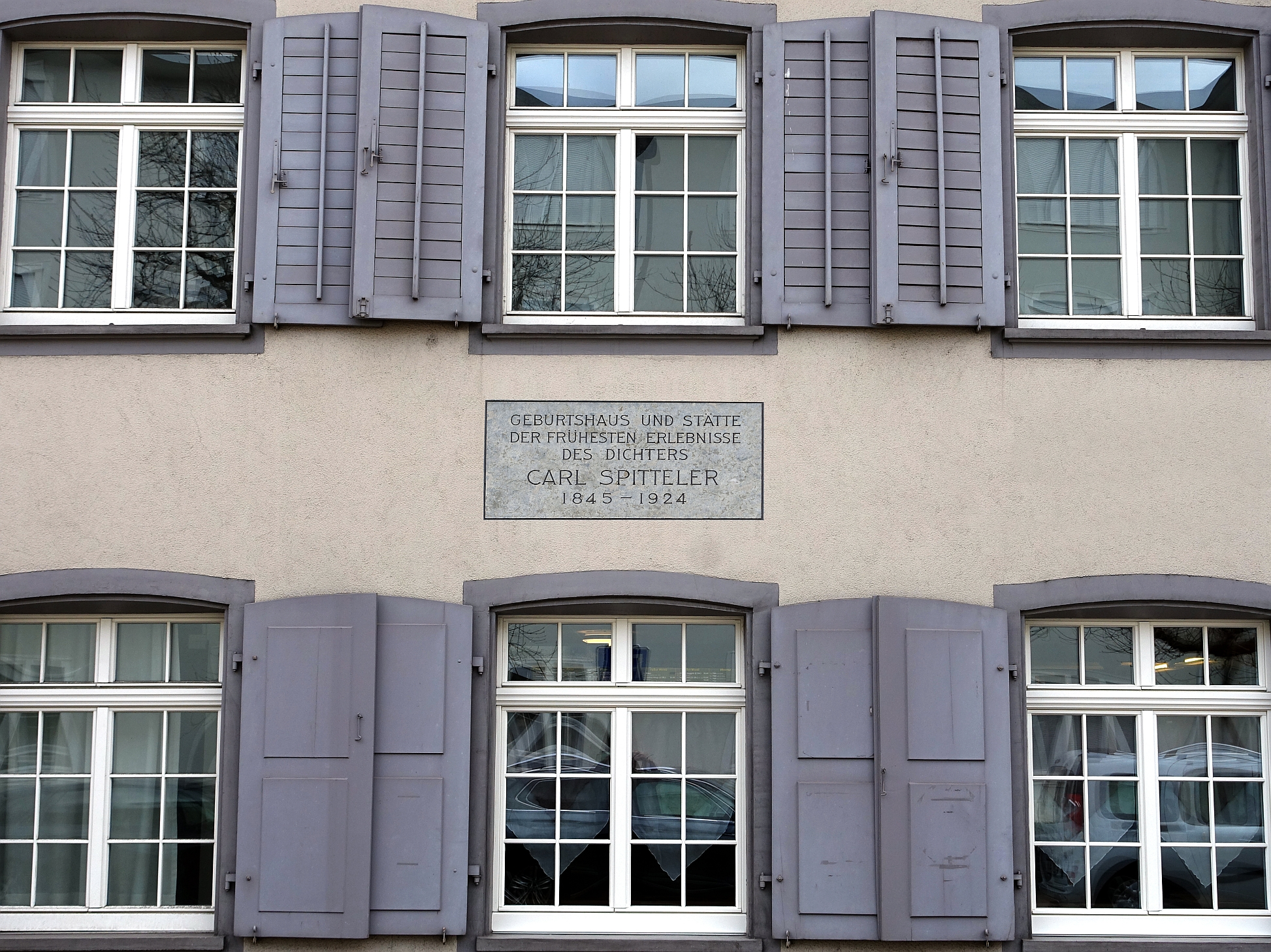 Geburtshaus von Carl Spitteler (1845–1924), an der Kasernenstrasse 22 in Liestal, Basel-Land, Schweiz. Standort 47°28'57.1"N 7°44'14.2"E